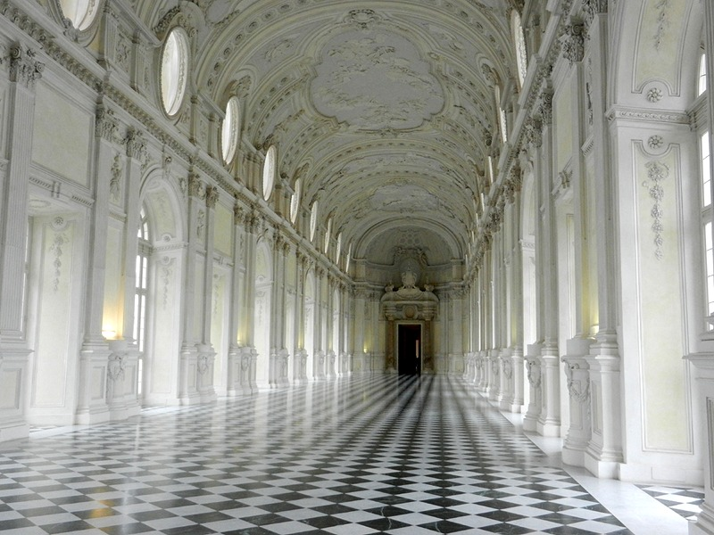 Venaria Reale - la Grande Galleria all'interno della Reggia